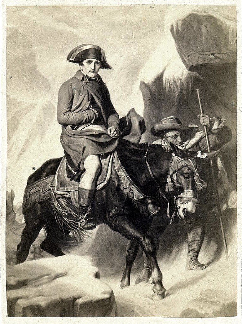 Gravure d'aprés "Bonaparte franchissant les Alpes" (de Paul Delaroche) par la Maison Goupil